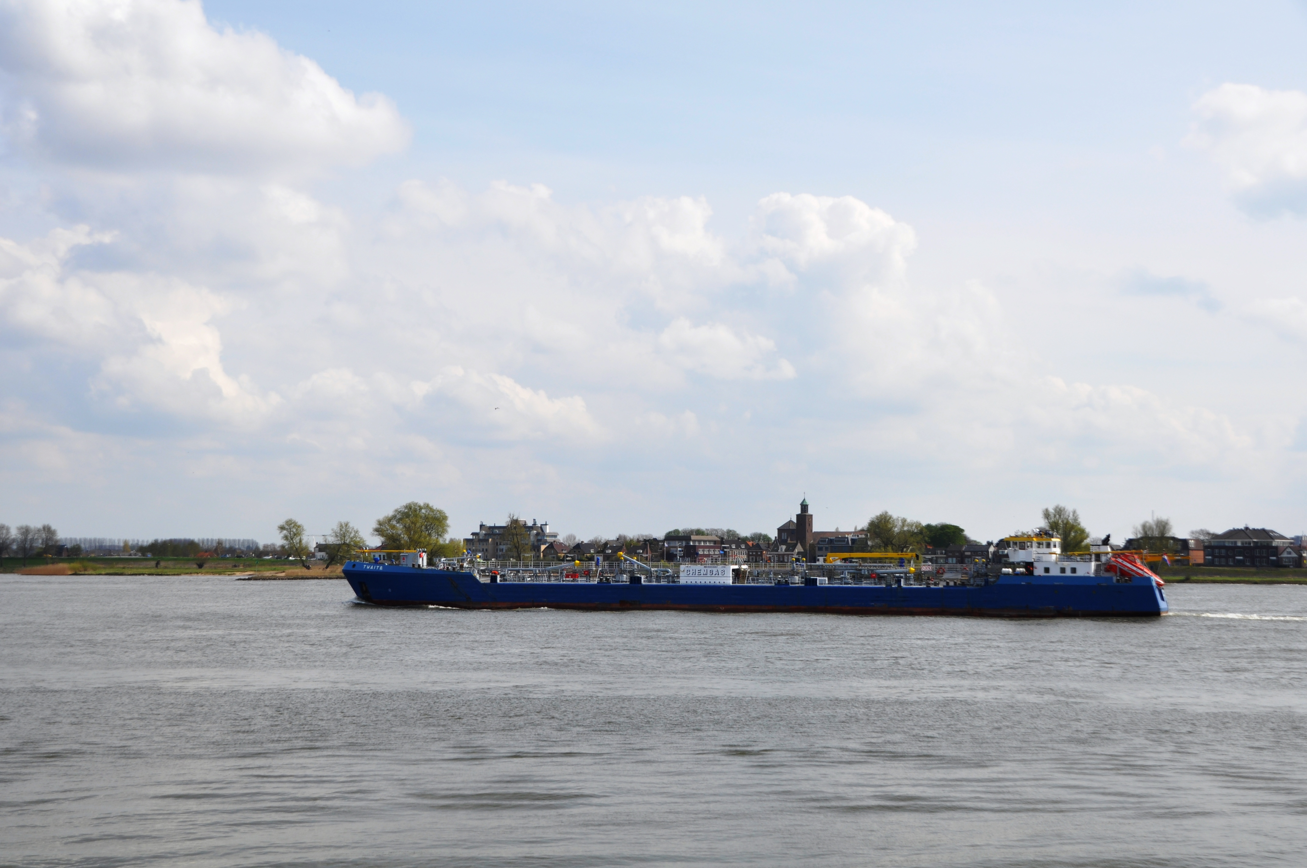 De TWAITE in de opvaart op de Merwede.